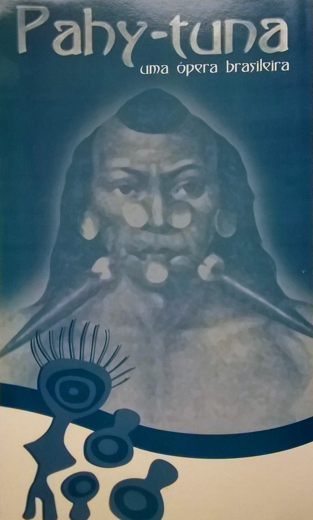 Programa da Ópera